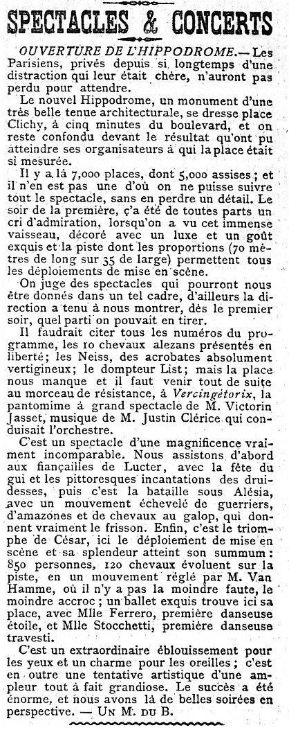 L'inauguration de l'Hippodrome situé 1 rue Caulaincourt à Paris dans le 18ème arrondissement.